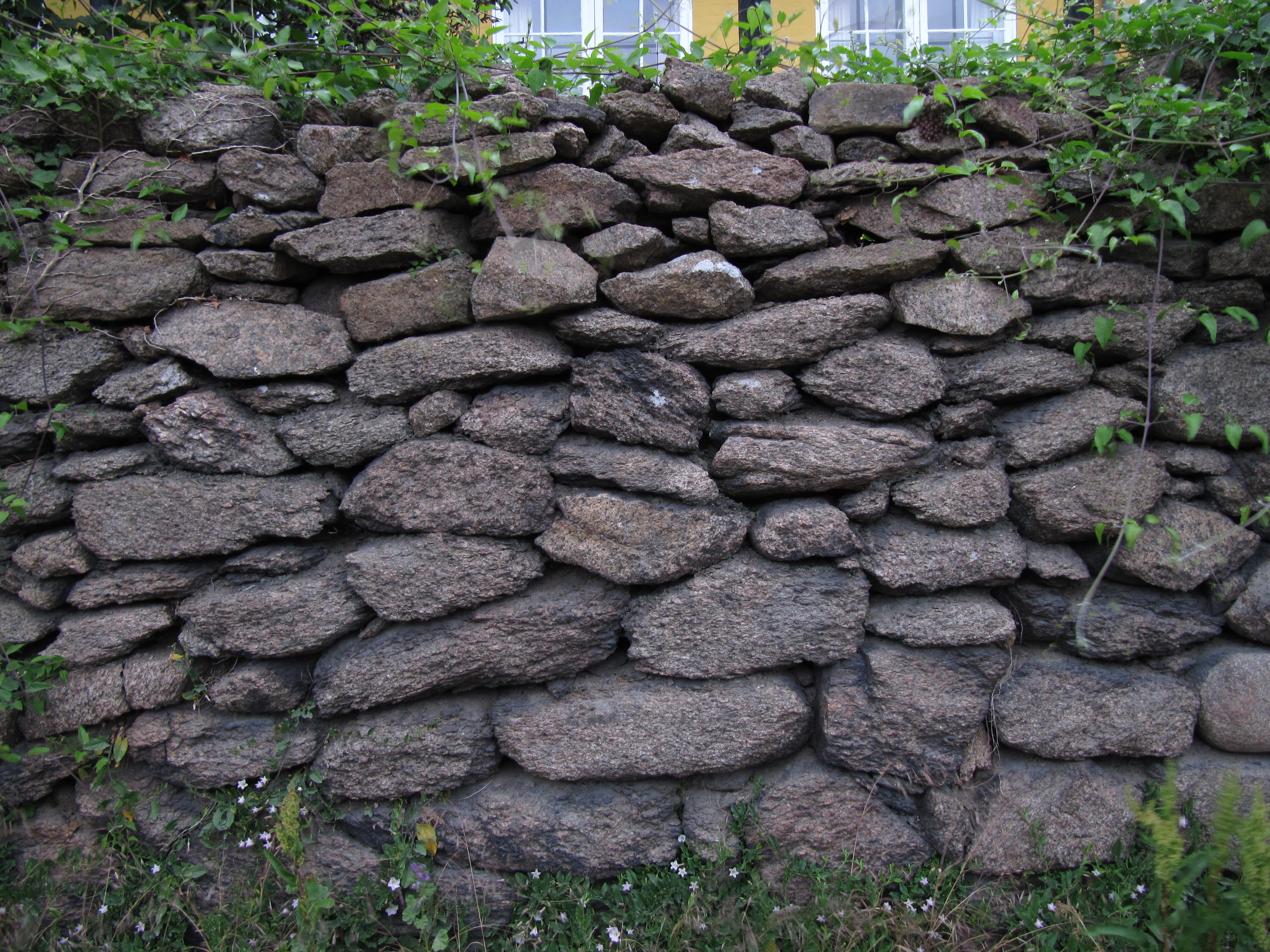 Stengærde af blokke af den grovkornede Svaneke Granit